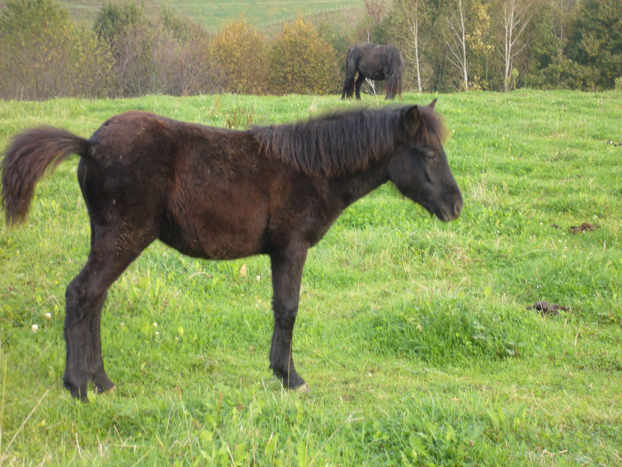 Pottoka moxala€